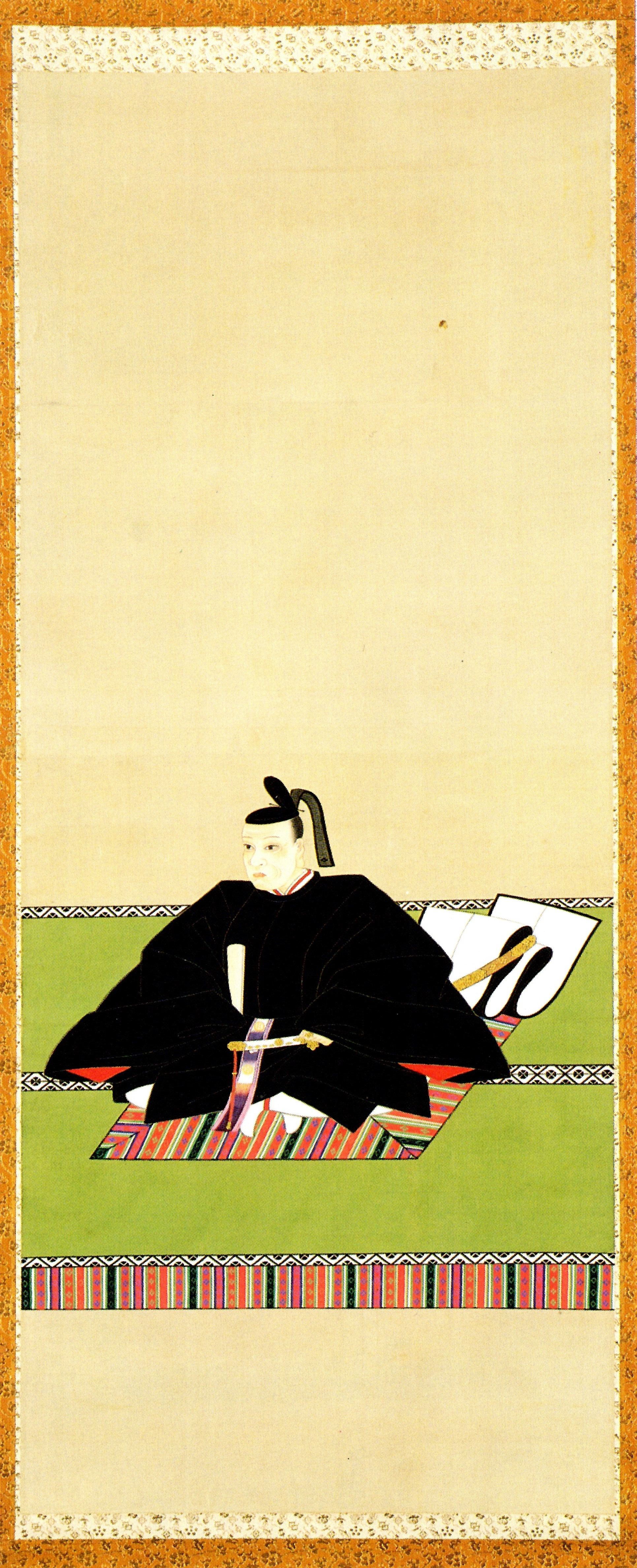 南部利済の肖像。